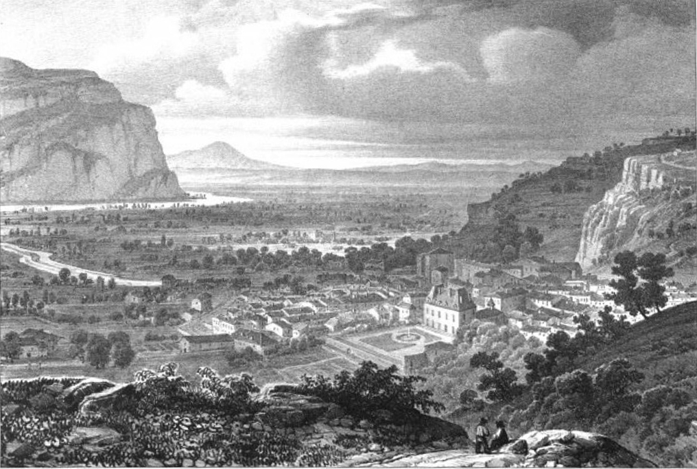 Album du Dauphiné - tome IV, litographie de Voreppe